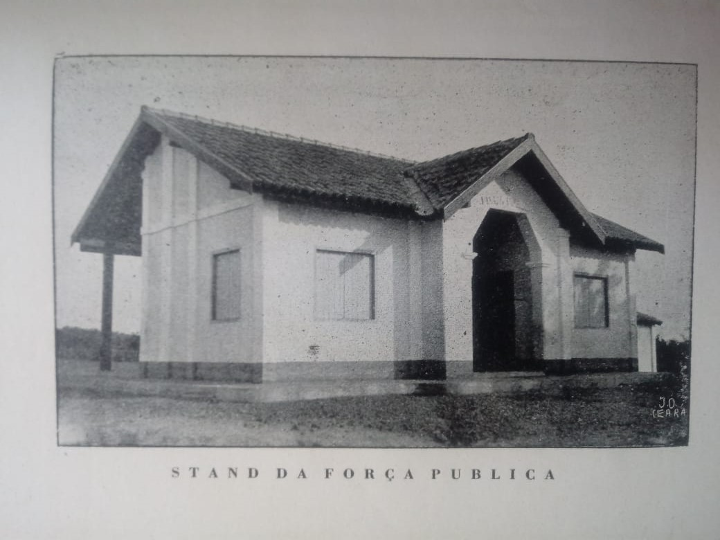 Posto da Força Pública do Piauí (atual Polícia Militar do estado do Piauí). Essa imagem está no Anuário do Piauí, na edição de 1935, uma publicação do Governo do estado do Piauí. Na frente, em alto relevo, tem o brasão do Piauí e e a inscrição "Força Publica".